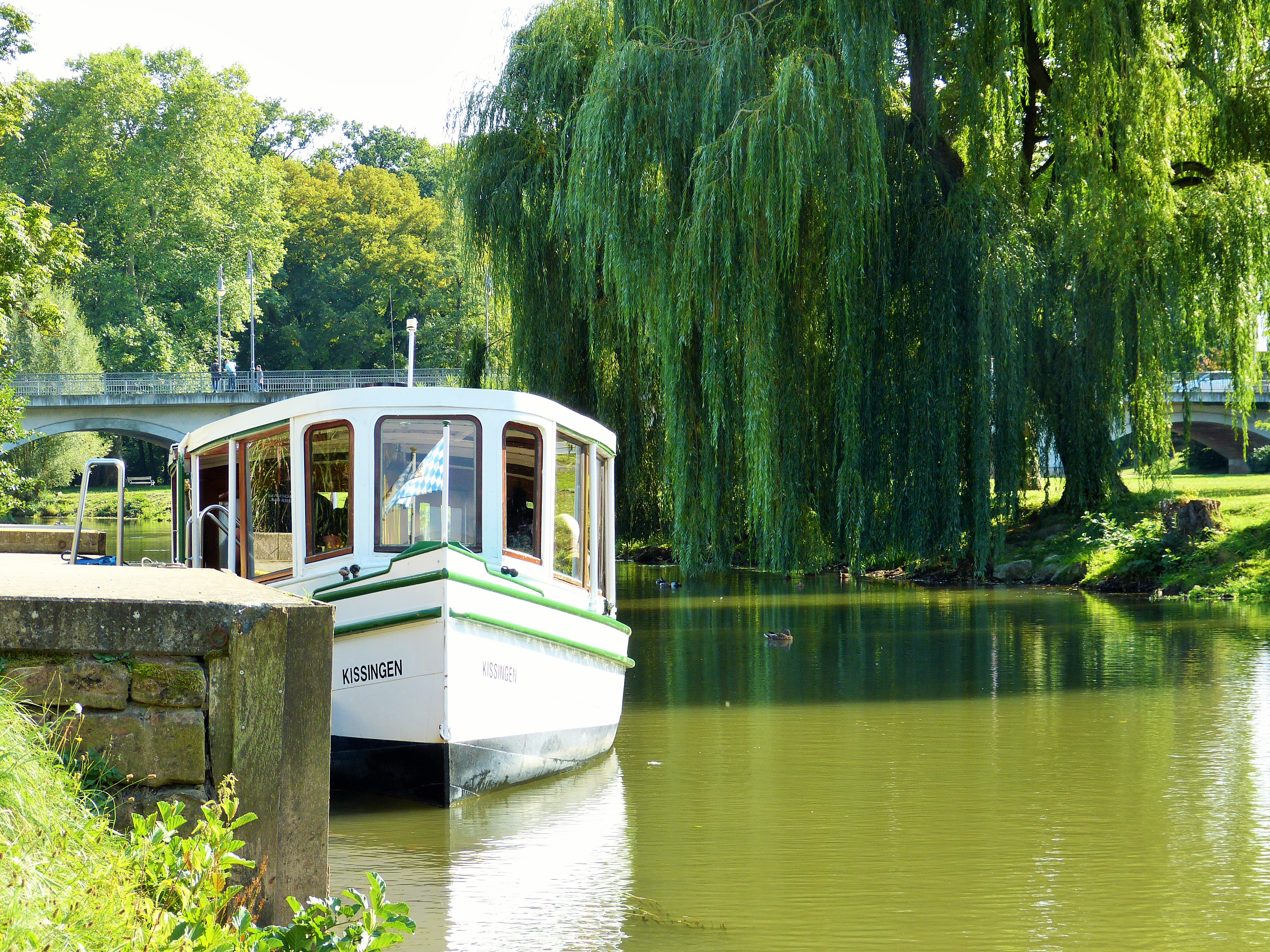 Kissingen, 2019